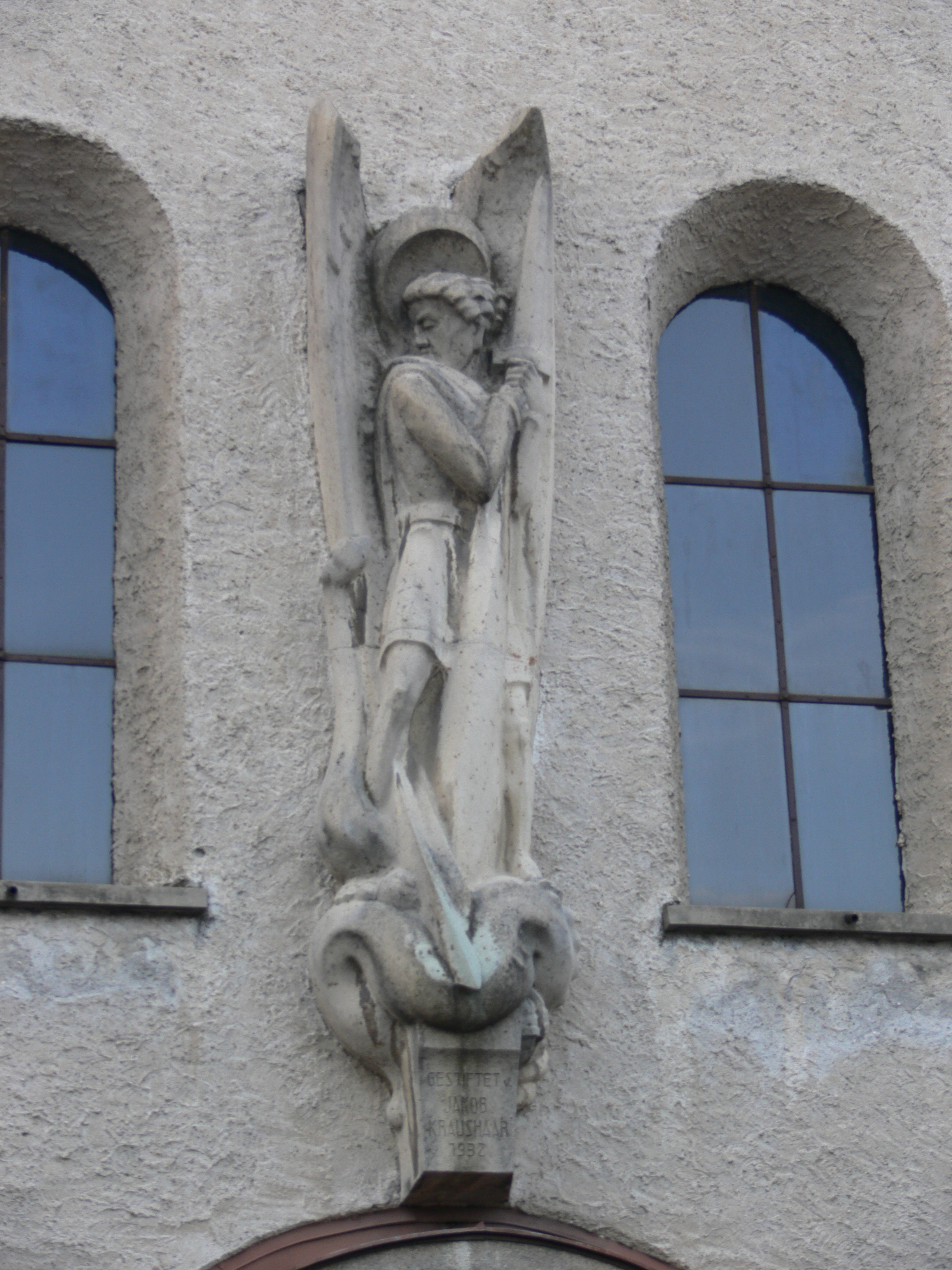 Pfarrkirche Mariahilf, Bregenz Hof (geplant als „Heldenhof“ der „Heldendankkirche“),Relief "Hl. Michael" von Albert Bechtold (Bregenz)